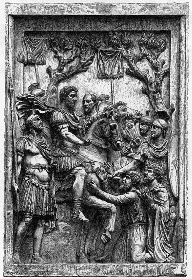 Kaiser Marcus Aurelius begnadigt Markomannenhäuptlinge, Abbildung eines antiken Marmorreliefs